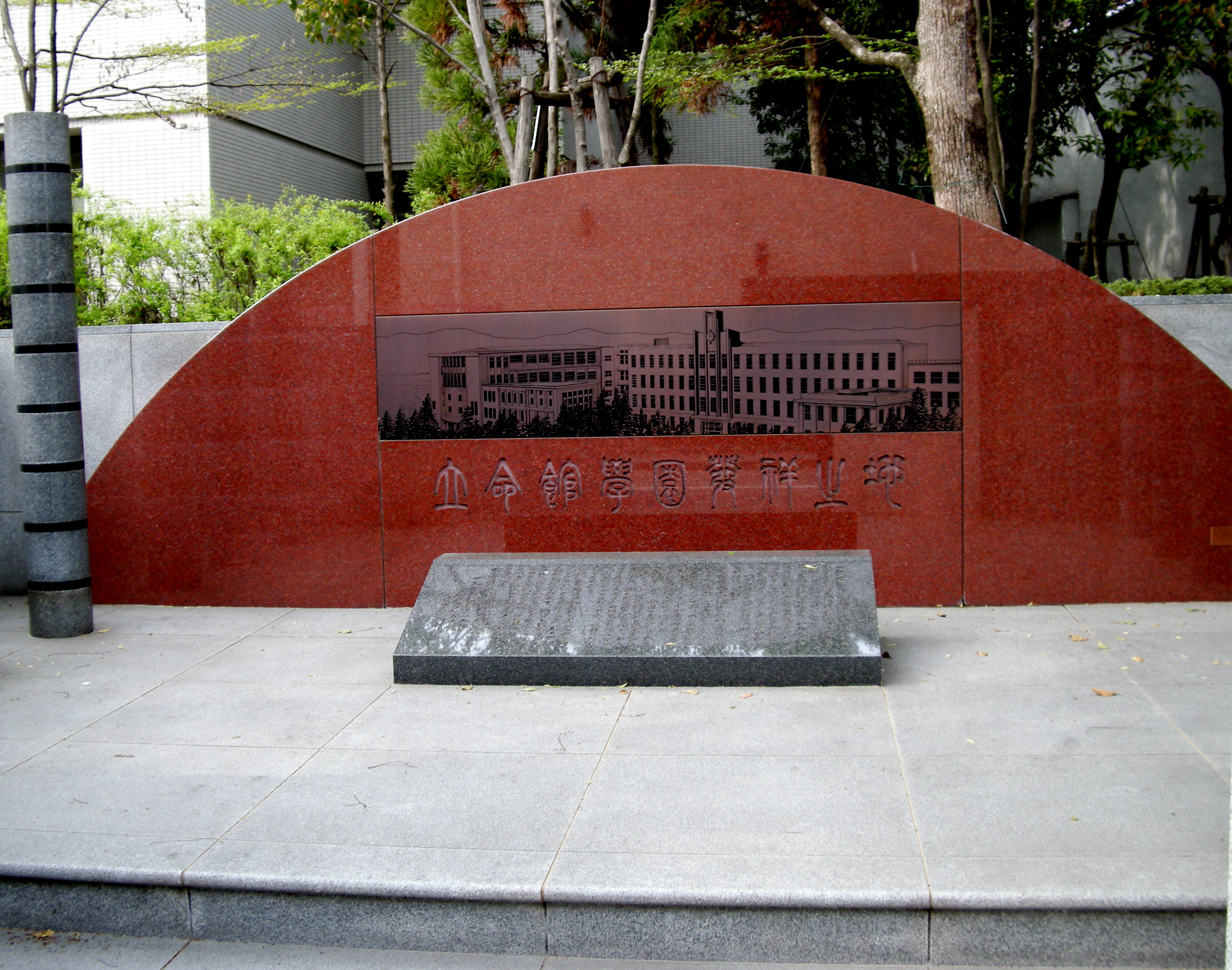 Ritsumeikan School Site (Hirokoji, Kyoto, Japan)